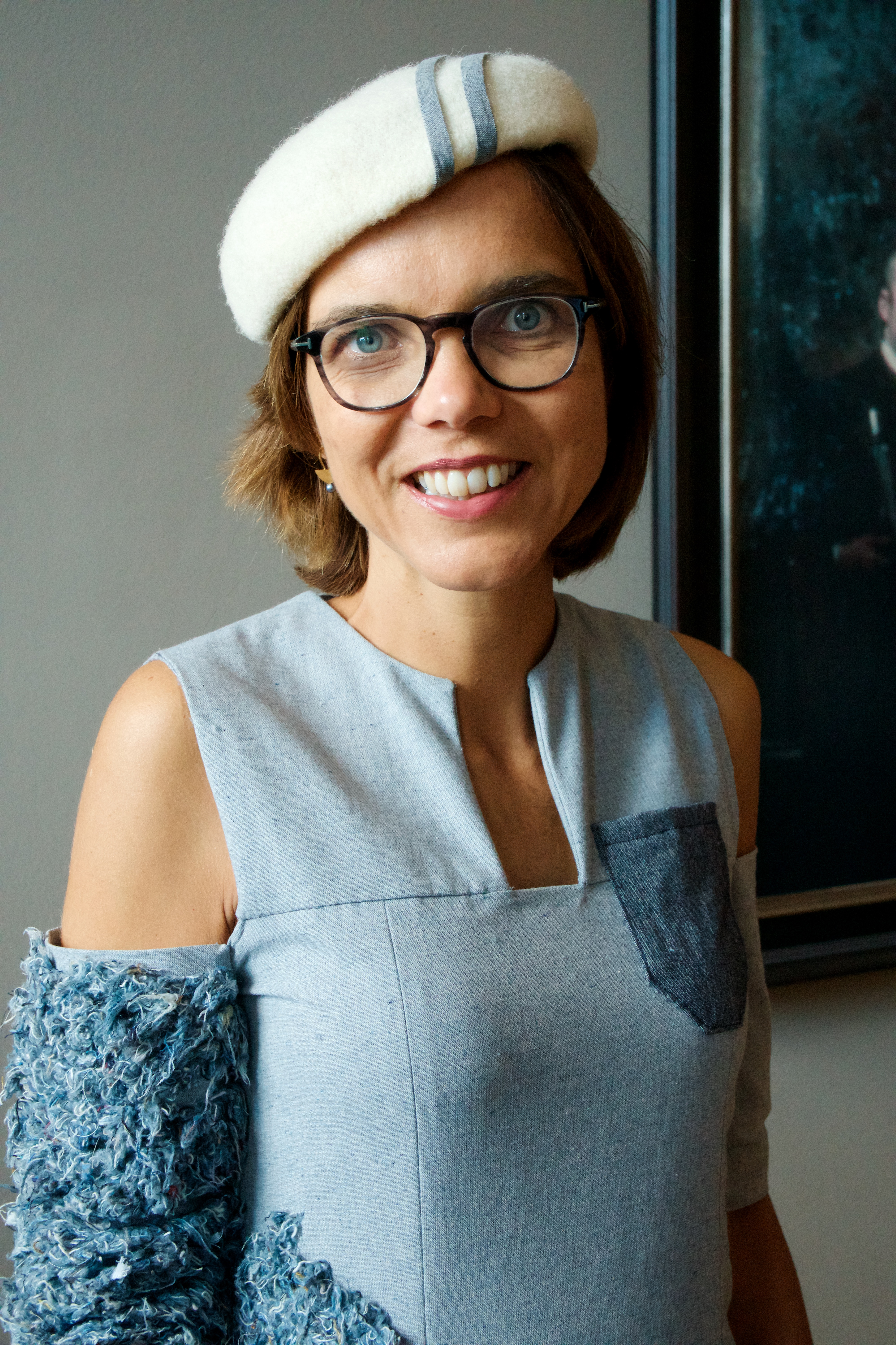 De Nederlandse politica Carla Dik-Faber (parlementariër voor de ChristenUnie) tijdens Prinsjesdag 2018, Den Haag